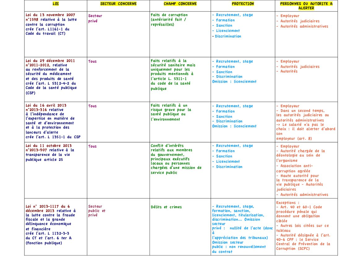 Ensemble des lois françaises relatives aux lanceurs d'alerte